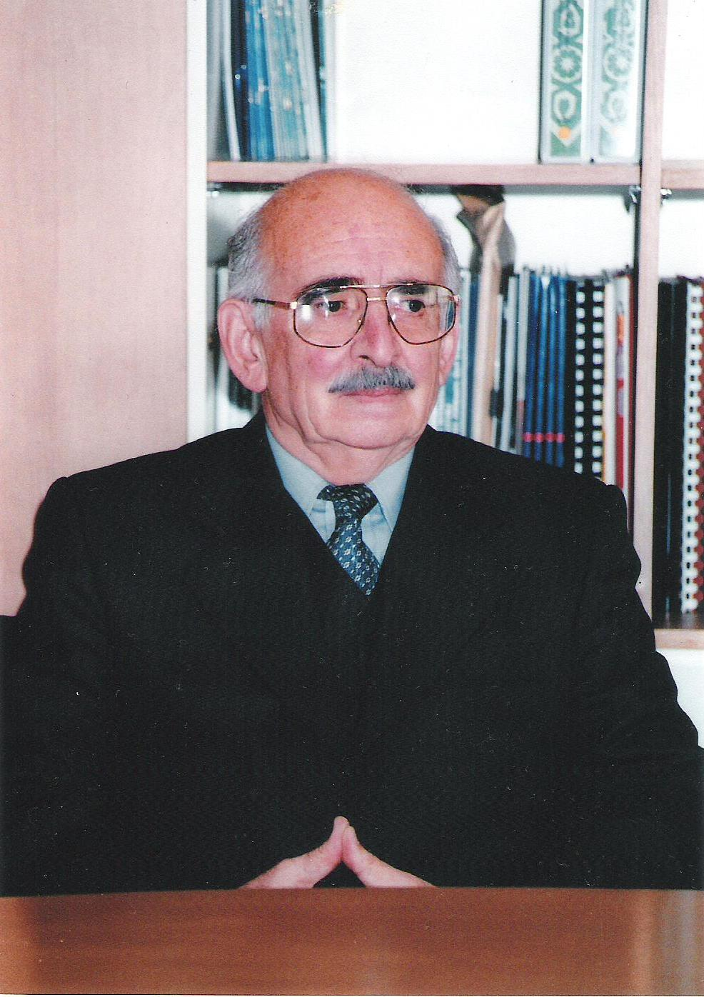 دکتر خسرو سعیدی